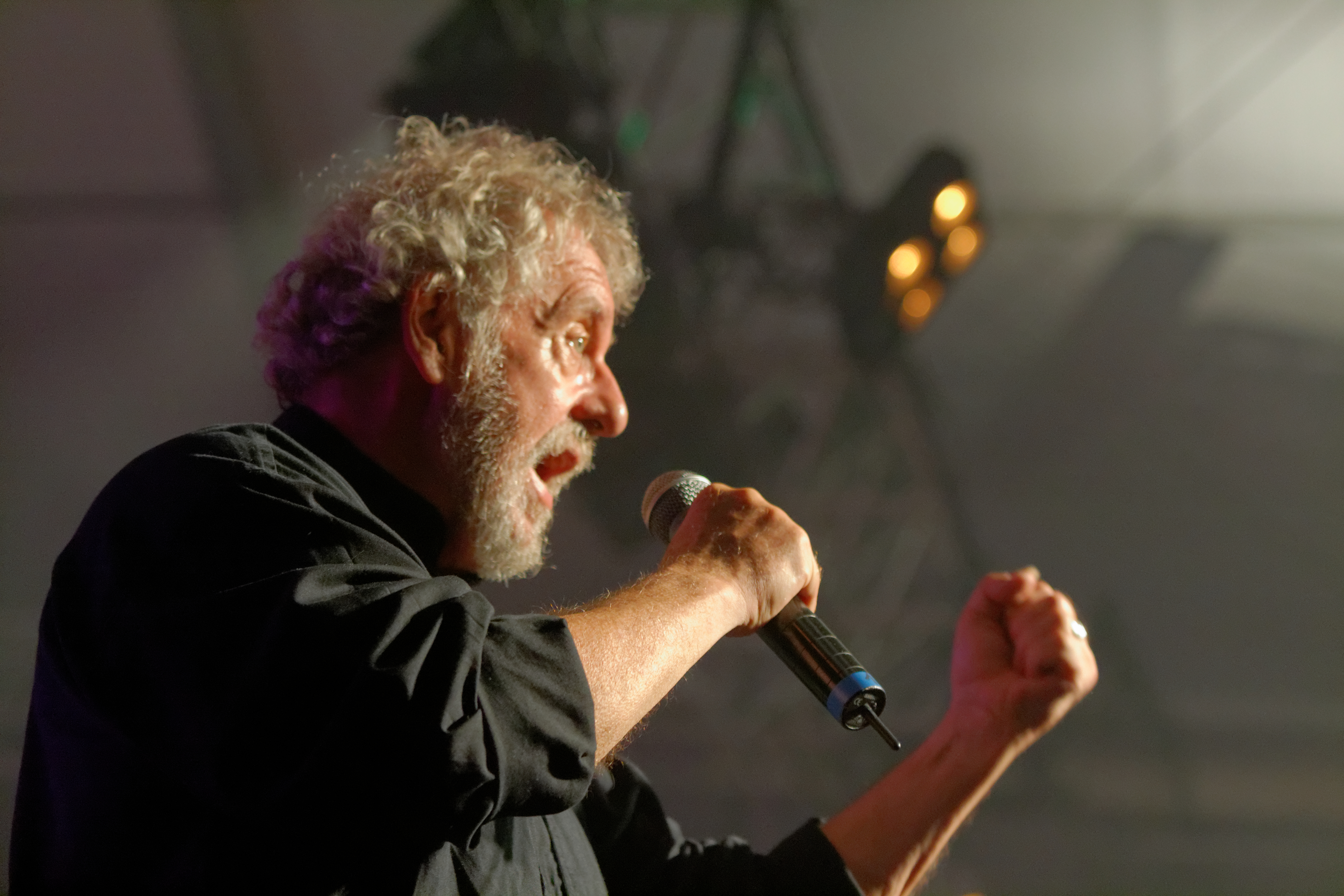 Dan Ar Braz et le bagad Kemper en concert à l'espace Gradlon lors du festival de Cornouaille 2013, à l’occasion des 90 ans du Cornouaille et des 20 ans de la création de l’Héritage des Celtes.